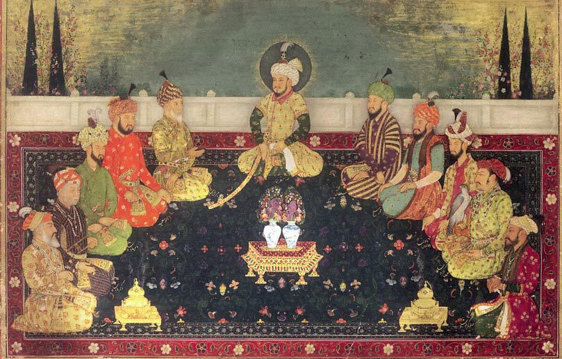 മുഗൾ ചക്രവർത്തിമാർ, തിമൂർ മുതലുള്ള തങ്ങളുടെ പൂർ‌വികരോടൊപ്പം ഇരിക്കുന്ന രീതിയിൽ വരച്ചിരിക്കുന്ന ചിത്രം. 1702-1712 കാലയളവിലെ ചിത്രമാണിത്. ചിത്രത്തിൽ ഇടതുവശത്തു നിന്നും വലത്തേക്ക്, ഷാജഹാൻ, അക്ബർ, ബാബർ, അബു സൈദ് (ബാബറിന്റെ മുത്തച്ഛൻ), തിമൂറിന്റെ പുത്രൻ മീരാൻ ഷാ (ബാബറിന്റെ മുത്തച്ഛന്റെ മുത്തച്ഛൻ), തിമൂർ (ചിത്രത്തിൽ മദ്ധ്യത്തിലിരിക്കുന്നു), മുഹമ്മദ് മിർസാ സുൽത്താൻ (ബാബറിന്റെ മുതുമുത്തച്ഛൻ), ഉമർ ഷൈഖ് (ബാബറിന്റെ പിതാവ്), ഹുമയൂൺ, ജഹാംഗീർ, ഔറംഗസേബ് എന്നിവരെ കാണാം.